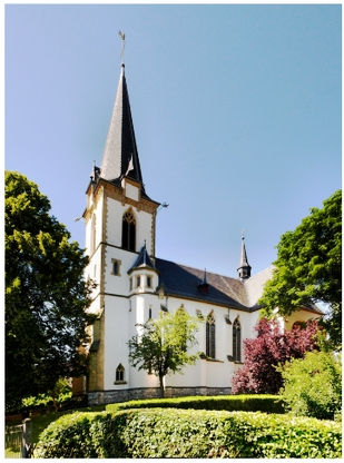 Kath.Kirche Joh.d.Täufer